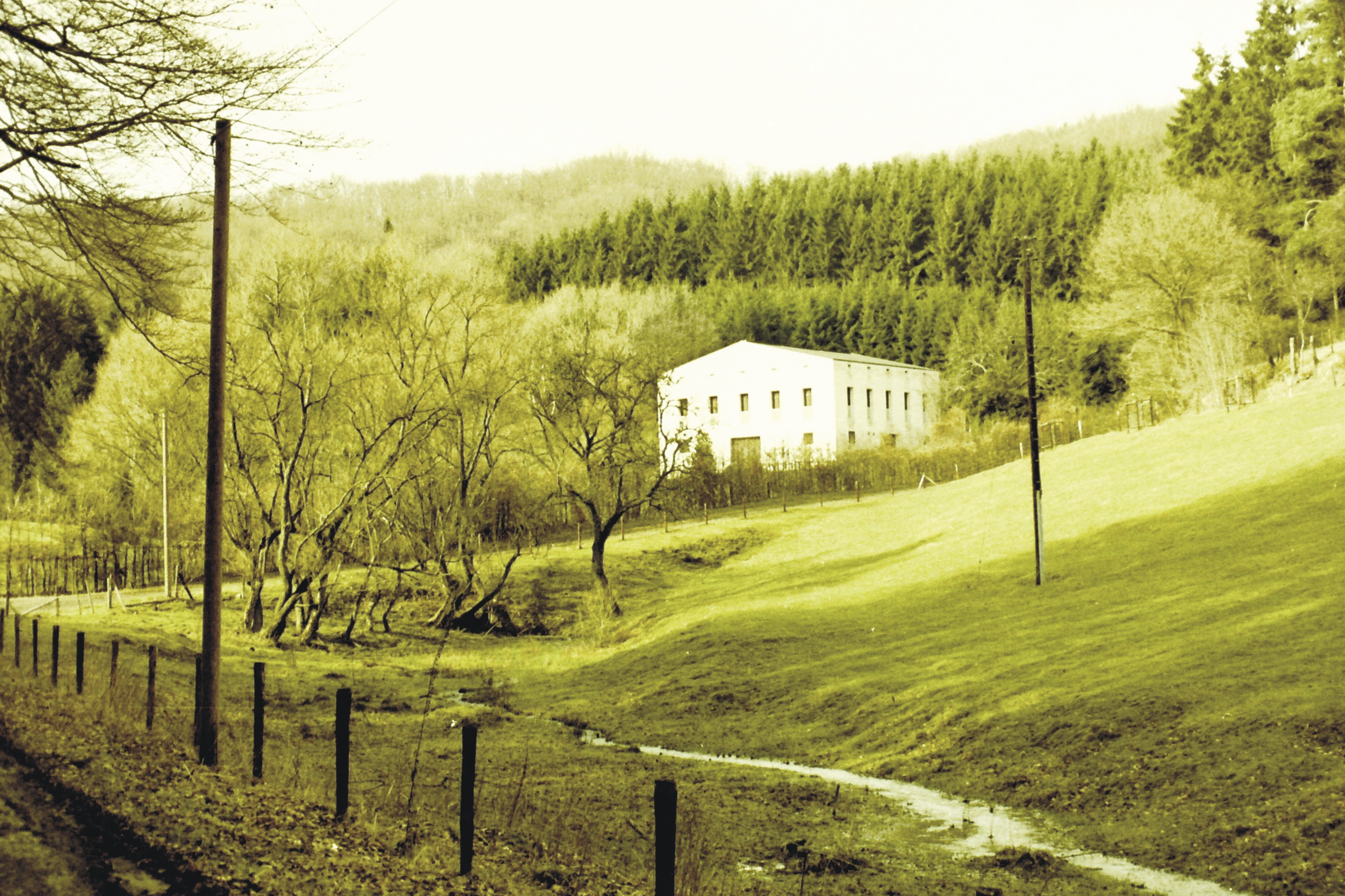 Idyllisch gelegene Glashütte mit kleinem Läschbach bei 54675 Utscheid. Im Hintergrund das Haus O.M. Ungers II. Aufnahme von 1997